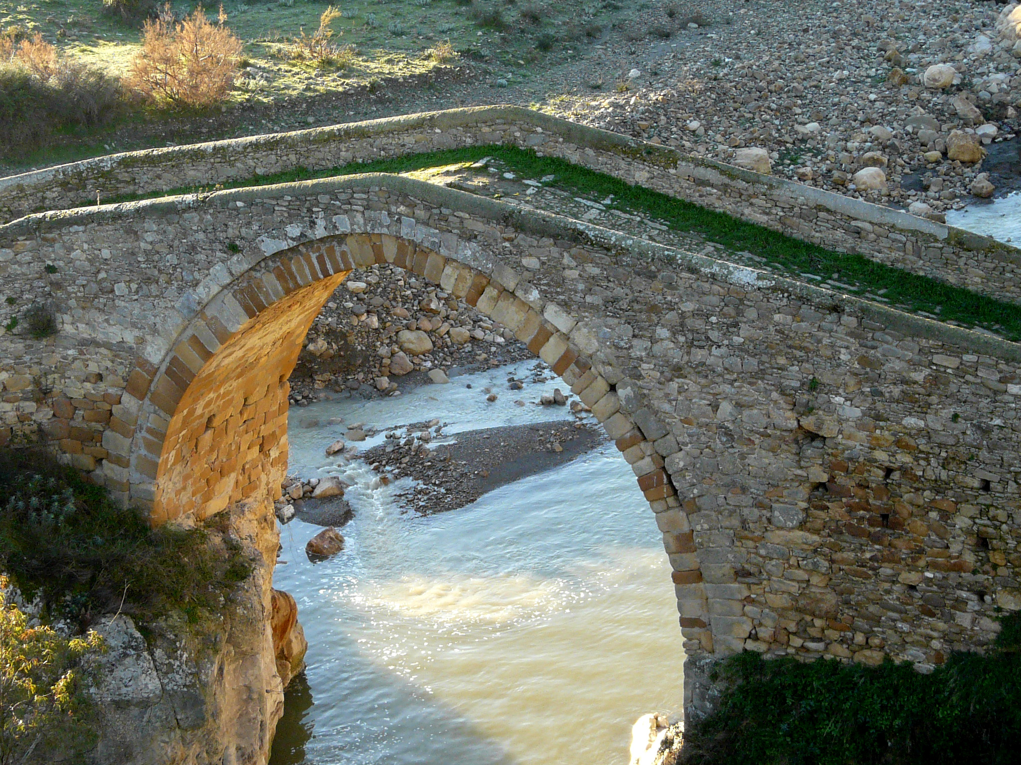 Cerami - Ponte (medioevale) di Cicerone sul fiume Cerami